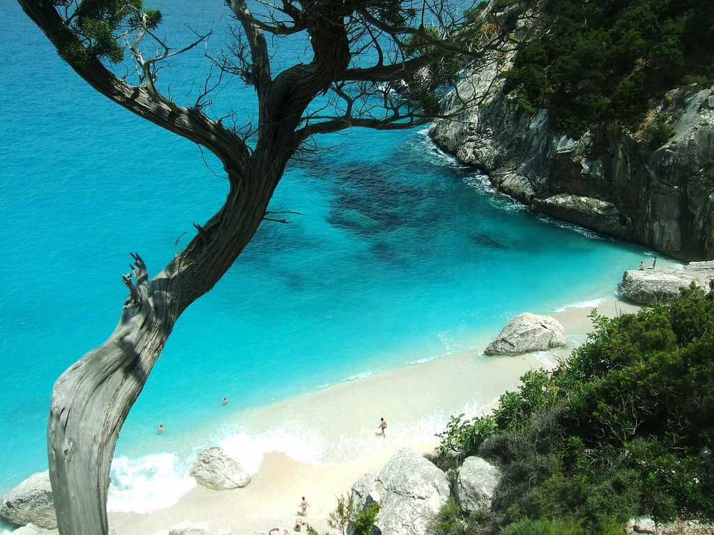 Cala Goloritzé, in Sardegna - Italia.